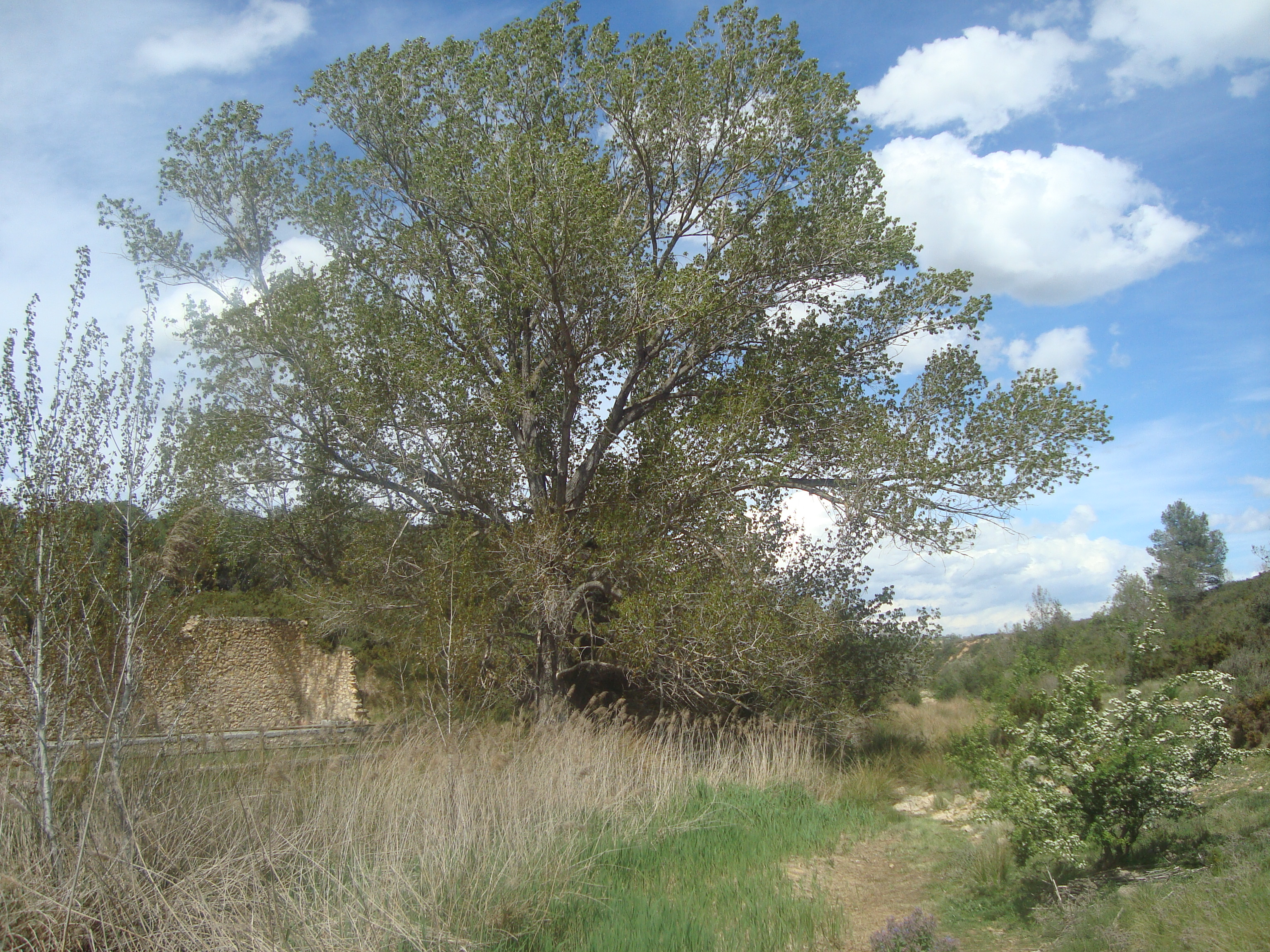 En marzo del año 2010, el Chopo negro de l’Assut fue reconocido como Árbol Monumental de la Comunidad Valenciana, y fue inscrito con el número 1742 en el Catálogo correspondiente, por la Dirección del Medi Natural de la Consellería de Medio ambiente. Con esta declaración, este ejemplar de Chopo Negro (Populus Nigra), recibe la máxima calificación y protección del Patrimonio Arbóreo de la Comunidad Valenciana. A parte, y de acuerdo con los informes de los técnicos de Consellería, se trataría de un ejemplar especialmente importante por las dimensiones de la copa y el tamaño de este tipo de Chopo, habiendo pocos chopos negros como el de l’Assut en todo el territorio valenciano. Por otro lado, por parte del Pleno del Ayuntamiento de Vilanova d’Alcolea, se aprobó por unanimidad, la declaración para este ejemplar de Árbol Monumental de Interés Local. Dotando a este Chopo de la máxima protección Local, así como la intención de tener adecuado el entorno del mismo para facilitar el uso y disfrute por los vecinos y vecinas del municipio, así como los visitantes de Vilanova d’Alcolea.